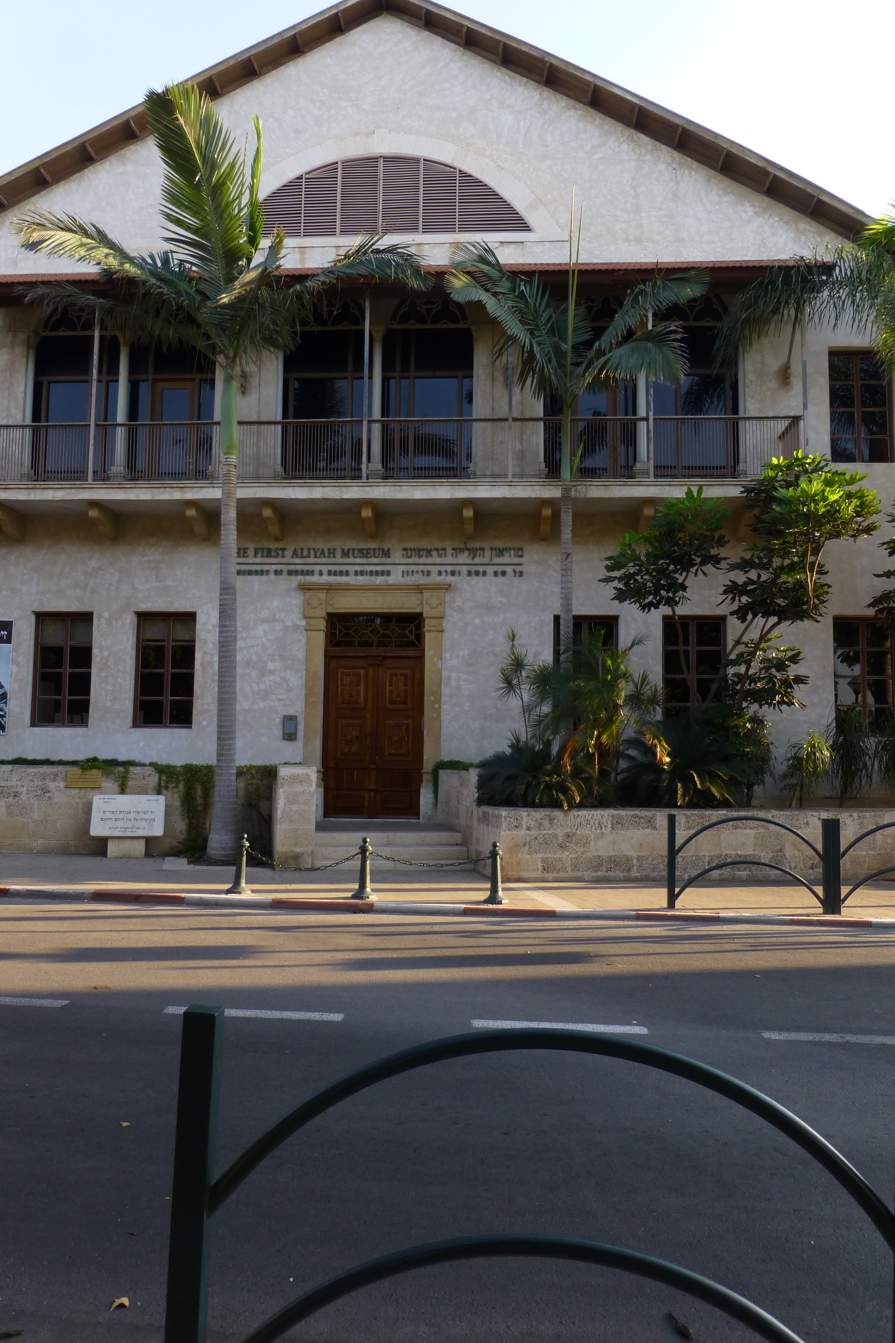 "בית הפקידות" - מוזיאון העליה הראשונה בזכרון יעקב